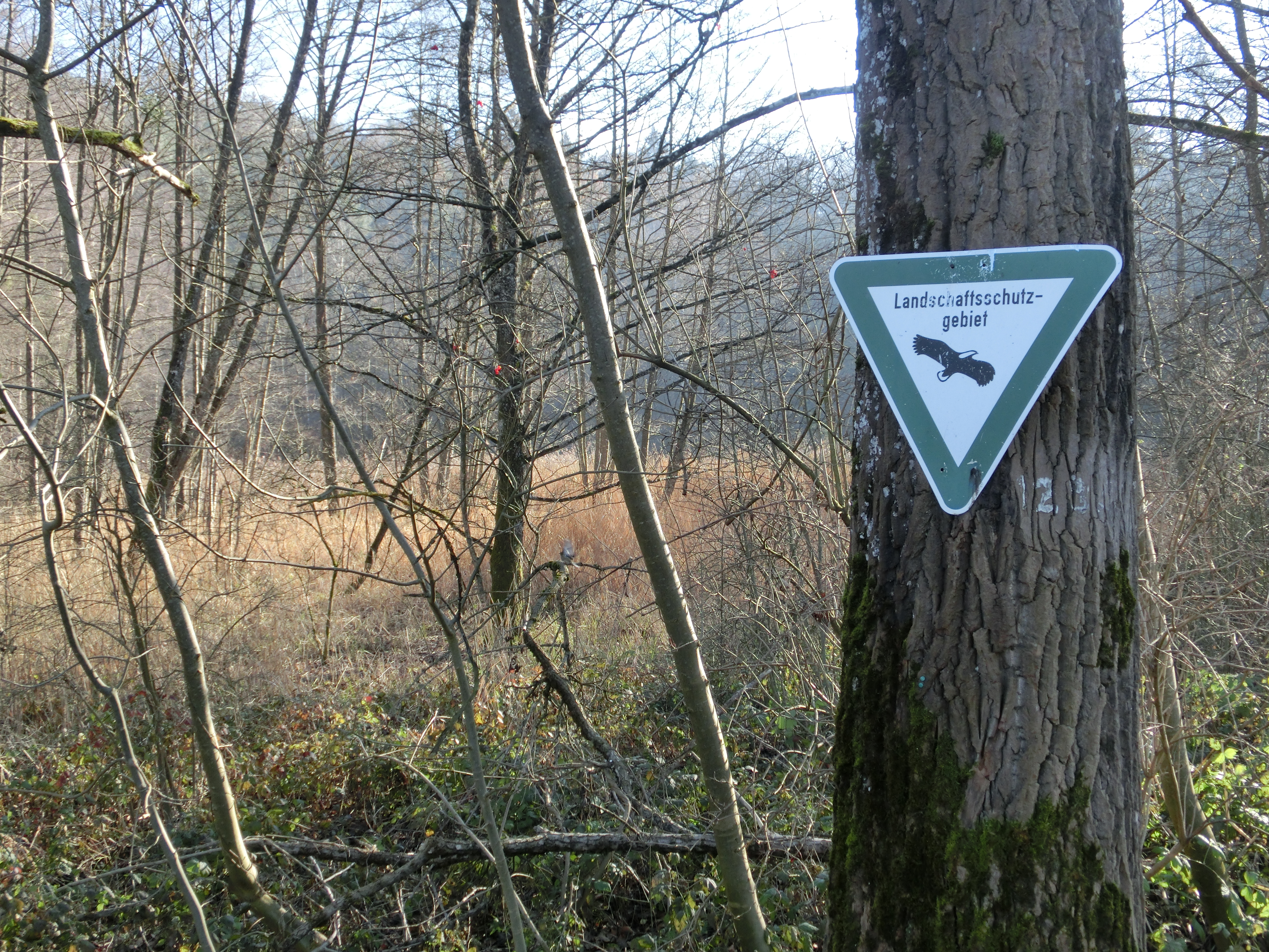 Deutschland - Baden-Württemberg - Bodenseekreis - Tettnang: Landschaftsschutzgebiet Tettnanger Wald